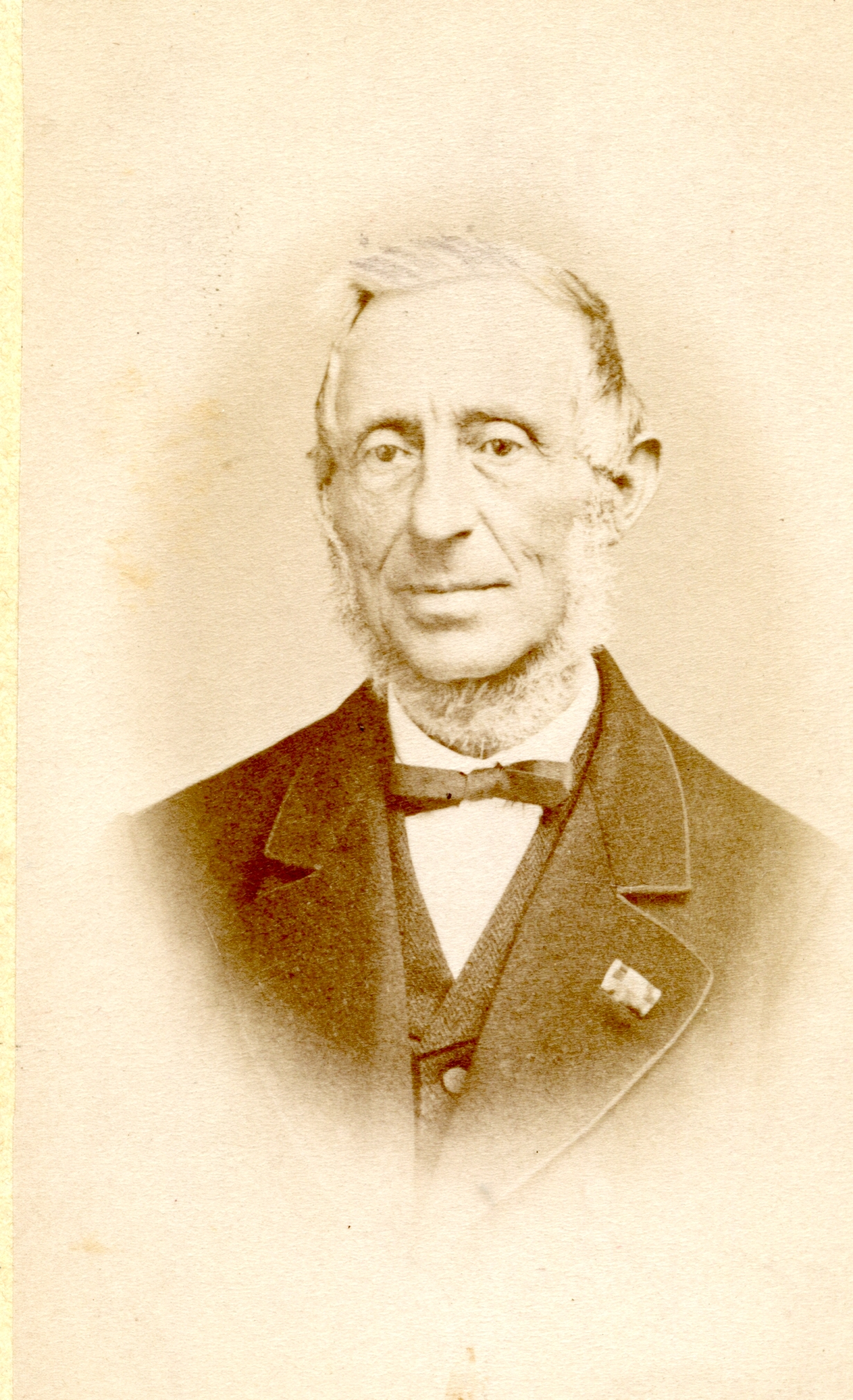 Foto aus Privatbesitz des Ur-Ur-Enkels Peter Brühl, Photographische Anstalt, Montabaur